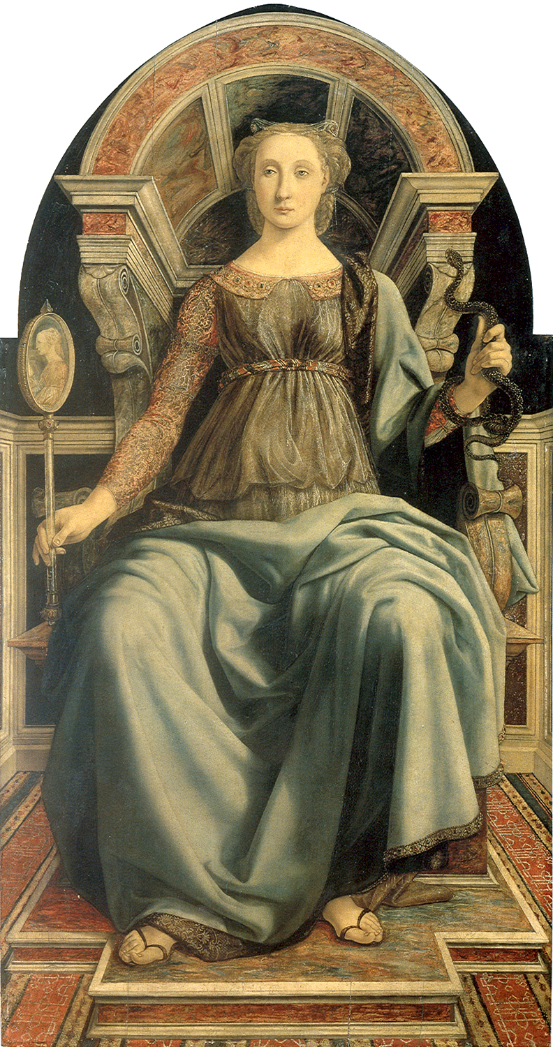 prudence Tempera on panel